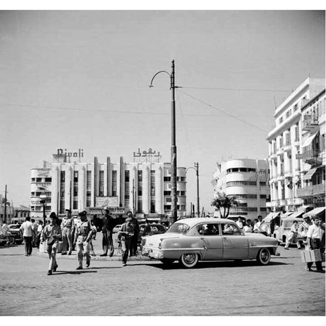 صورة تاريخية لساحة البرج في بيروت عام 1955